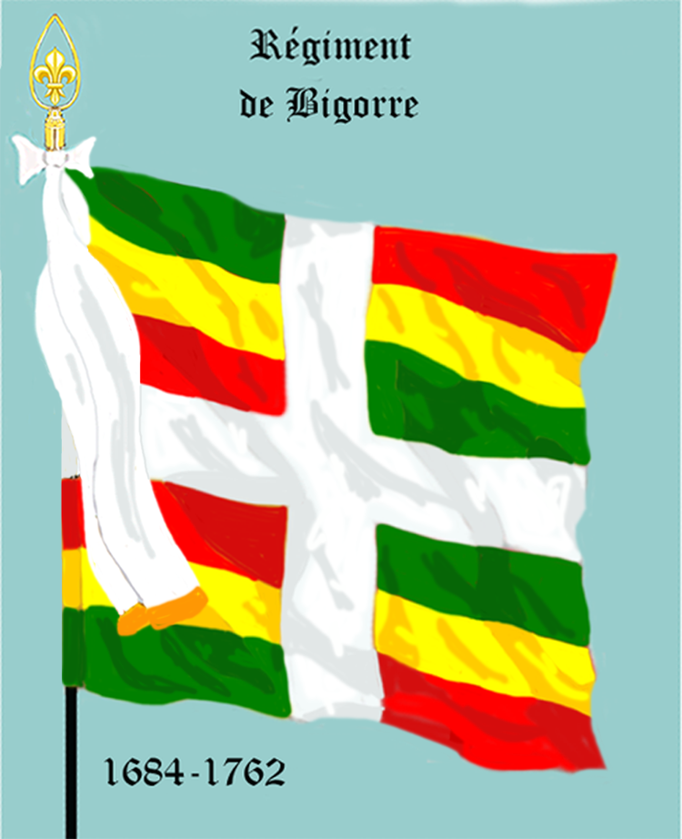 Ordonnanzfahne eines königlich französischen Infanterie-Regiments. - Entnommen und überarbeitet aus: „LES UNIFORMES ET LES DRAPEAUX DE L'ARMÉE DU ROI“ Marseille 1899. (Drapeau d'Ordonnance d' un régiment française d'infanterie royale.)